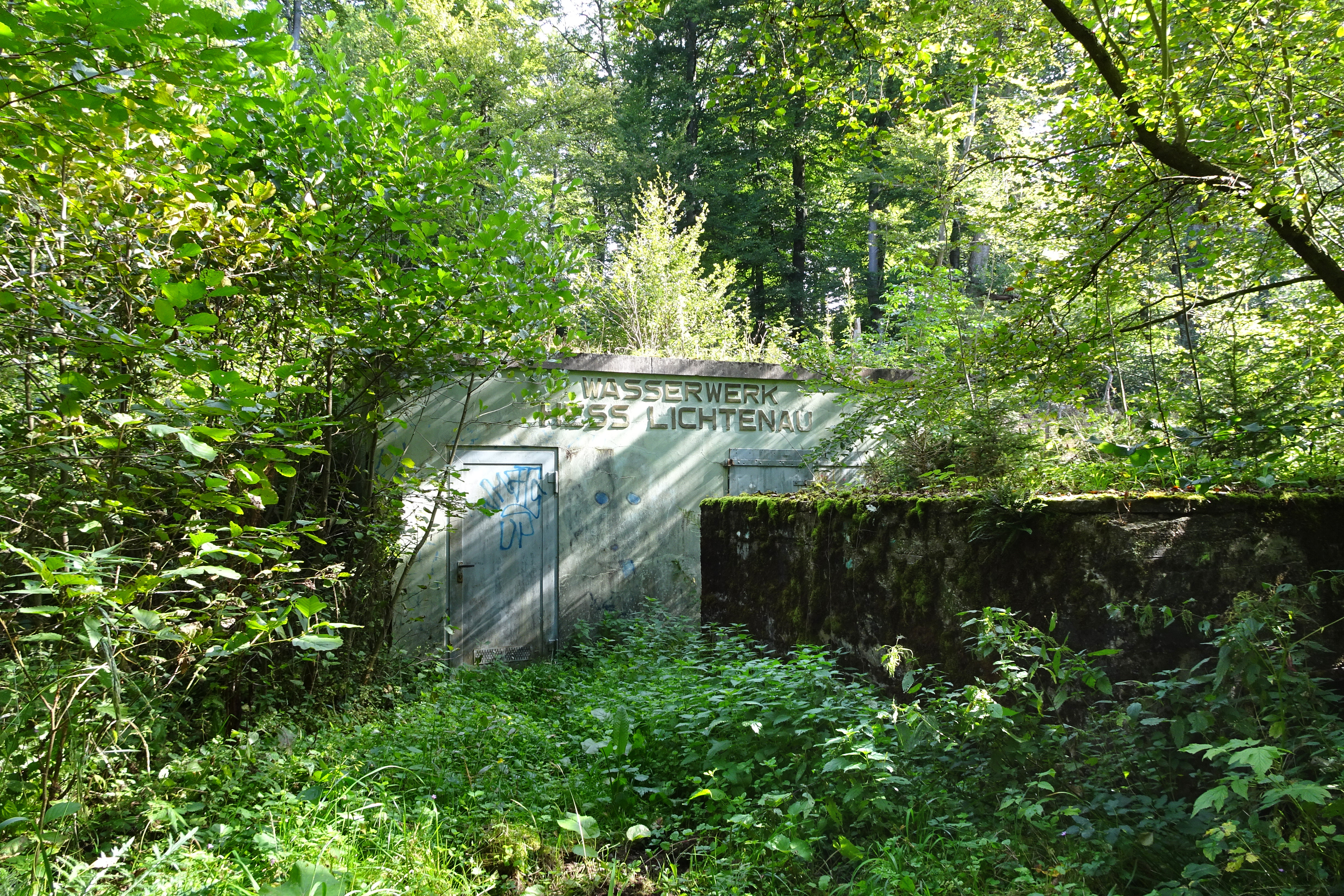 Das Naturschutzgebiet „Steinbachtal und Hirschhagener Teiche“ liegt in dem Stadtgebiet von Hessisch Lichtenau im nordhessischen Werra-Meißner-Kreis. Mit der Unterschutzstellung im Jahr 1997 sollte das an seltenen Tier- und Pflanzenarten reiche Waldwiesental sowie die Teiche mit ihren angrenzenden Bereichen erhalten, geschützt und durch geeignete Pflegemaßnahmen weiterentwickelt werden.